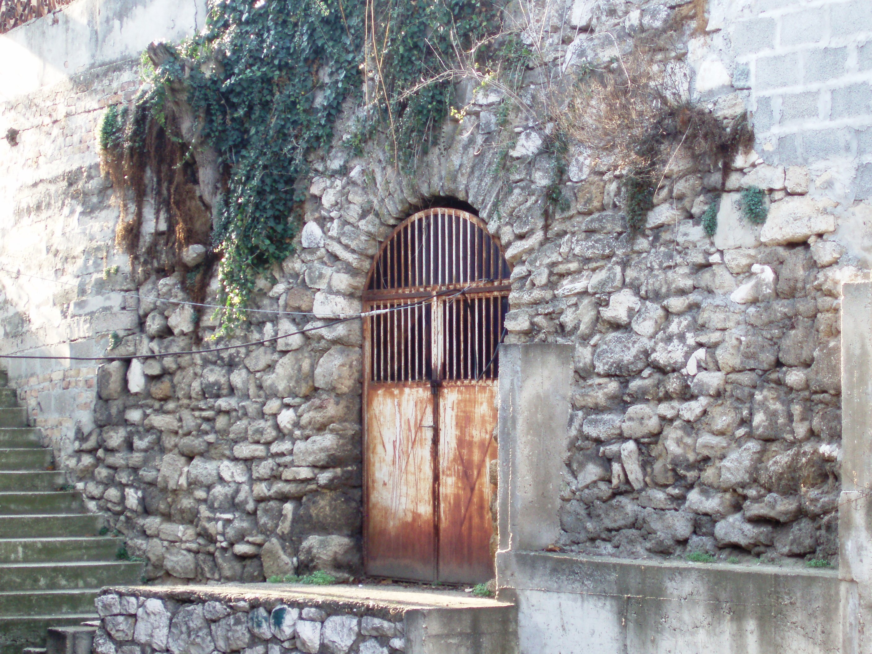 Ulaz u jedan od mnogobrojnih laguma koji su ukopani u uzvišice Gardoš, Ćukovac i Kalvariju, autor fotografije: Nicolo